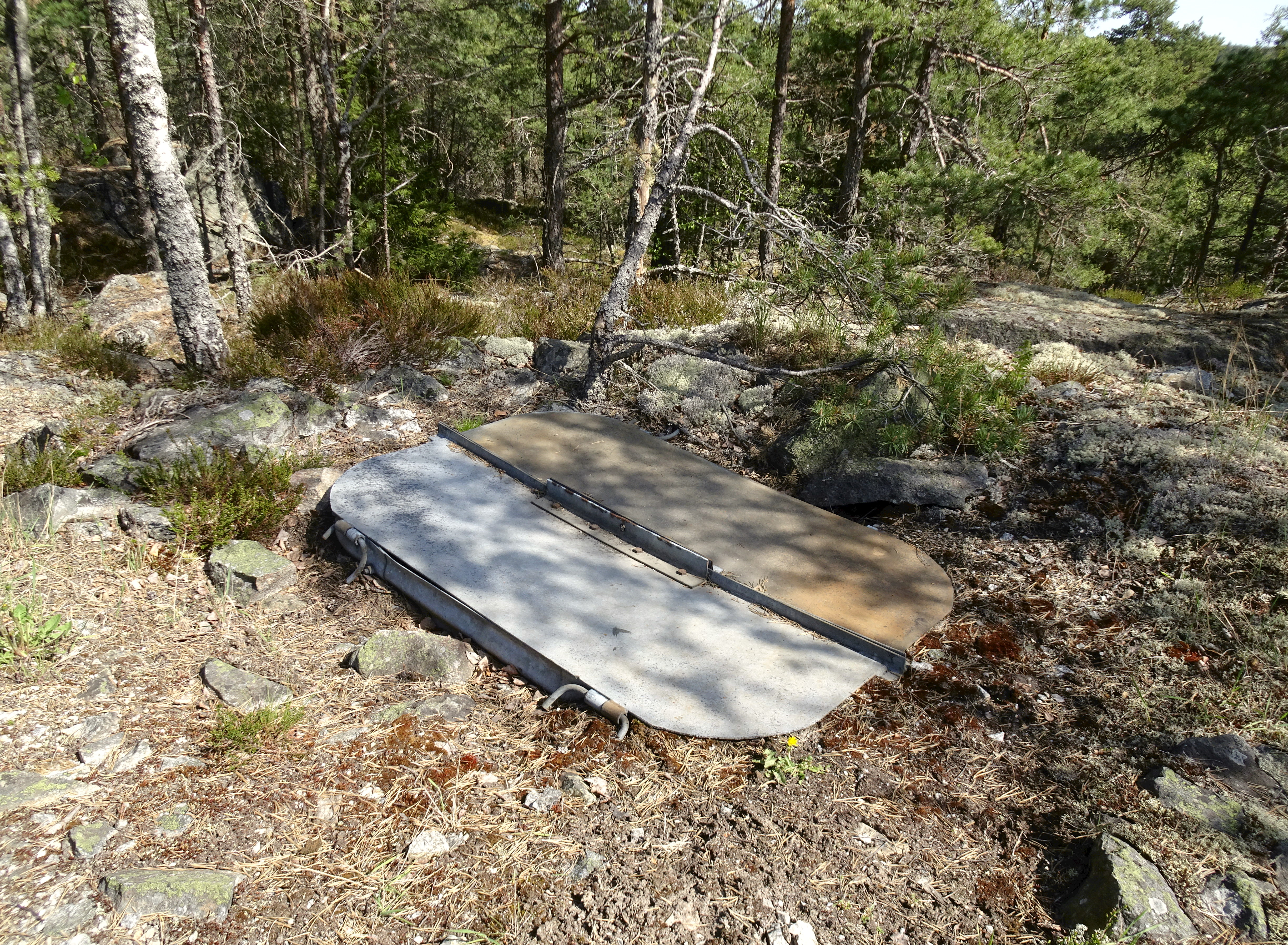 Reservutgång för ledningscentralen Vargen, Huddinge